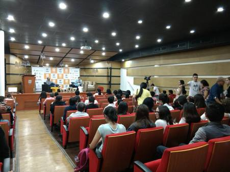 Auditorio menor Alfonso Gómez Gómez